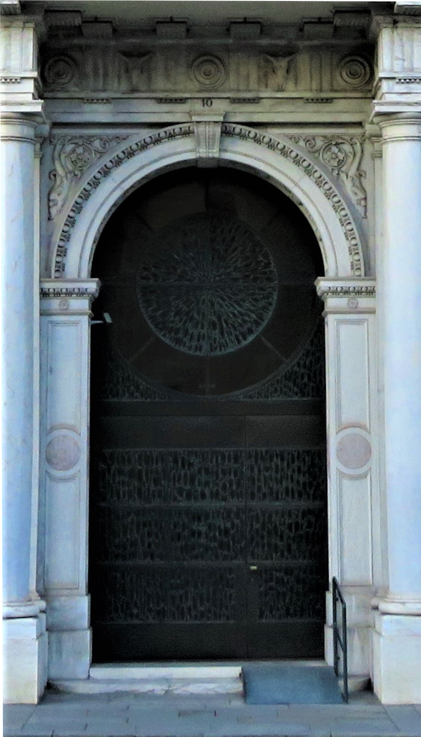 Facciata in largo Castello, particolare: il portone in bronzo.